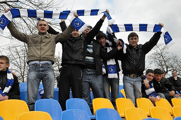 Вболівальники ФК "Вентура+"